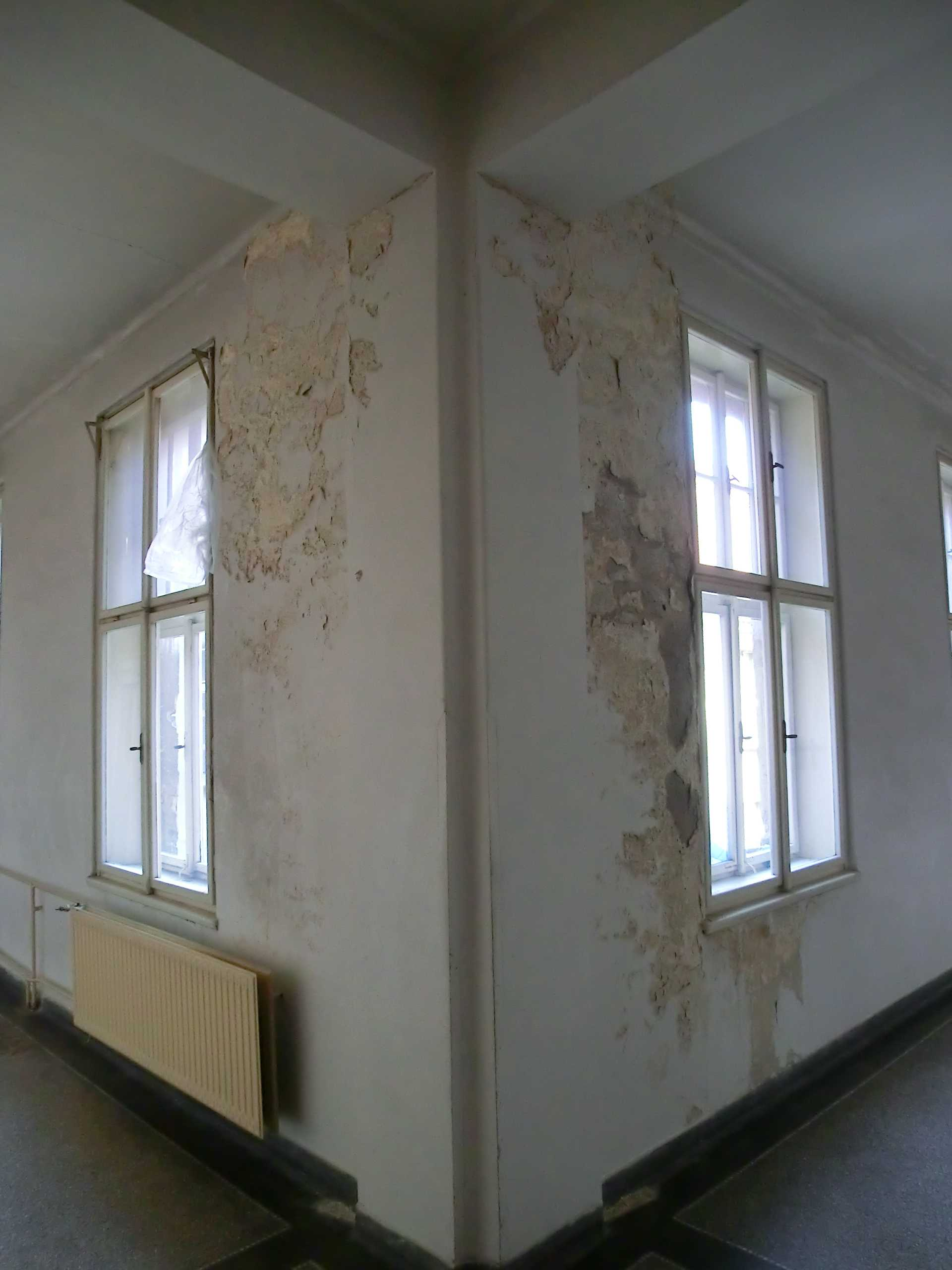 Budova pošty (bývalého Okresního soudu) v Jilemnici - zničené zdivo od léta zatékající srážkové vody